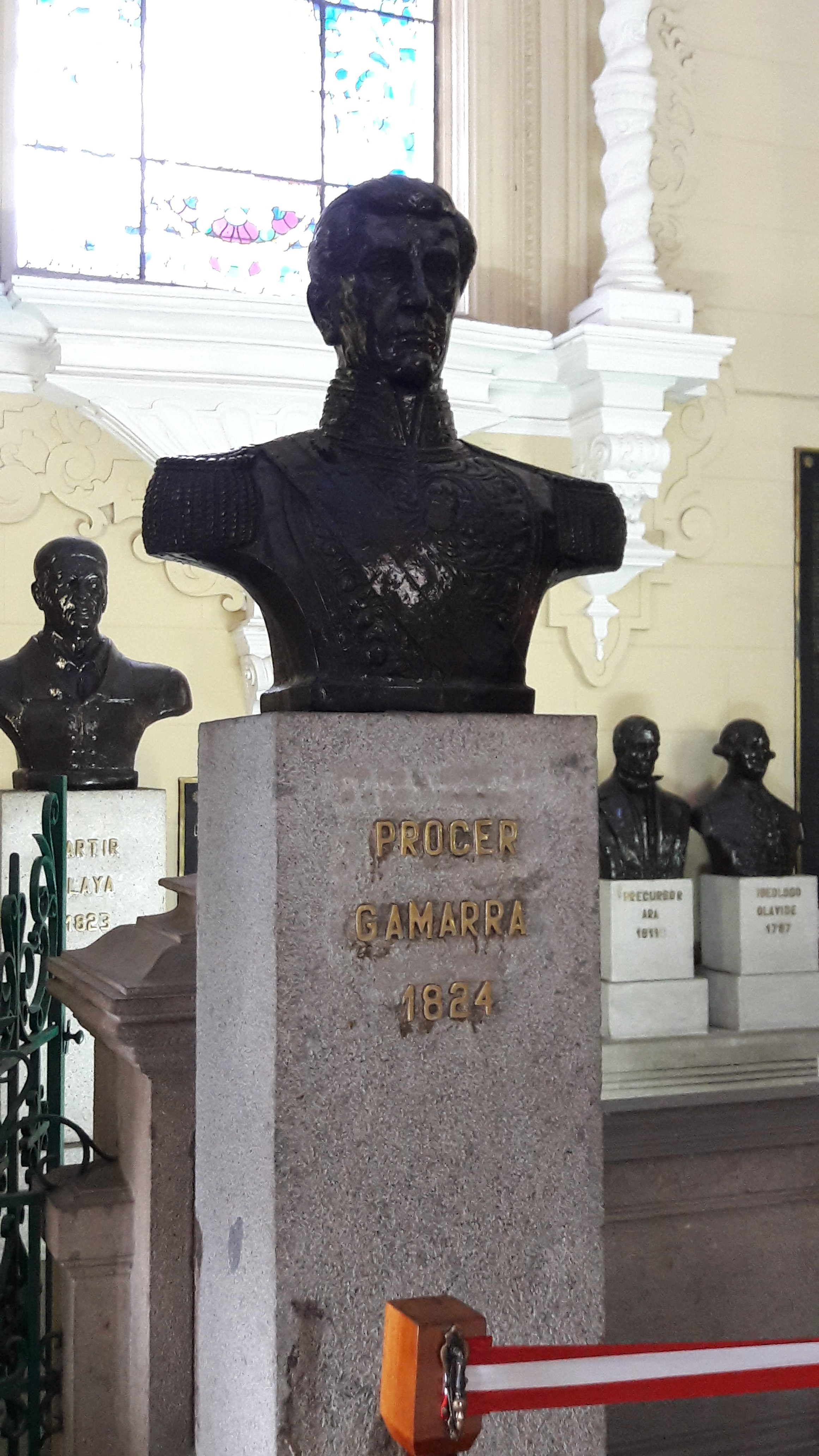 Prócer Gamarra 1824